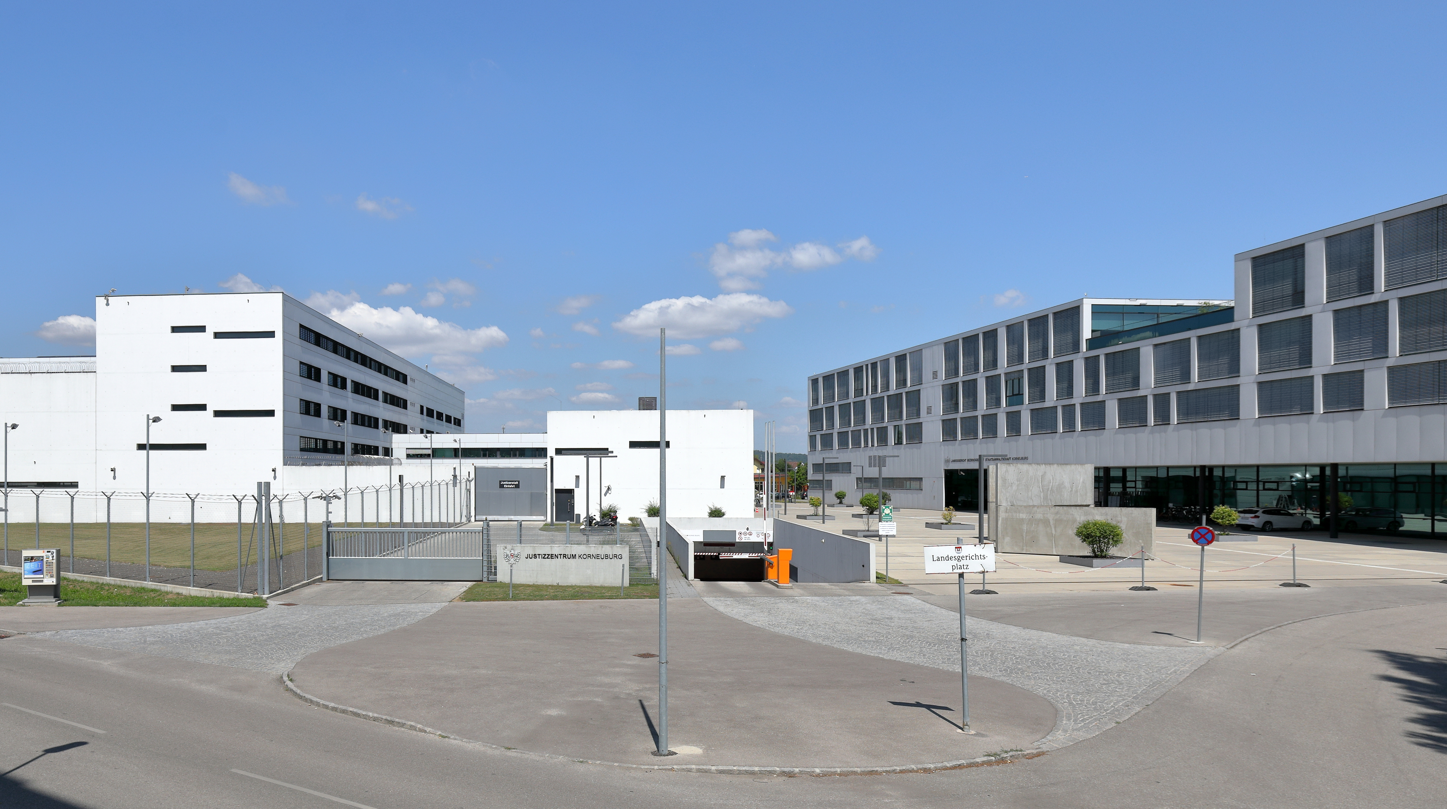 Das Justizzentrum mit der Justizanstalt (links) und dem Landes- und Bezirksgericht (rechts) in der niederösterreichischen Stadtgemeinde Korneuburg.Der Komplex wurde um 77 Mio. Euro nach Plänen der ARGE Dieter Mathoi Architekten ZT GmbH und der Architekturwerkstatt din a4 ZT GmbH errichtet und Ende 2012 eröffnet. Das Gerichtsgebäude weist eine Nutzfläche von rund 16.900 m² auf. Die Justizanstalt, auf rund 18.000 m² Nutzfläche, ist für rund 250 Haftplätze konzipiert.